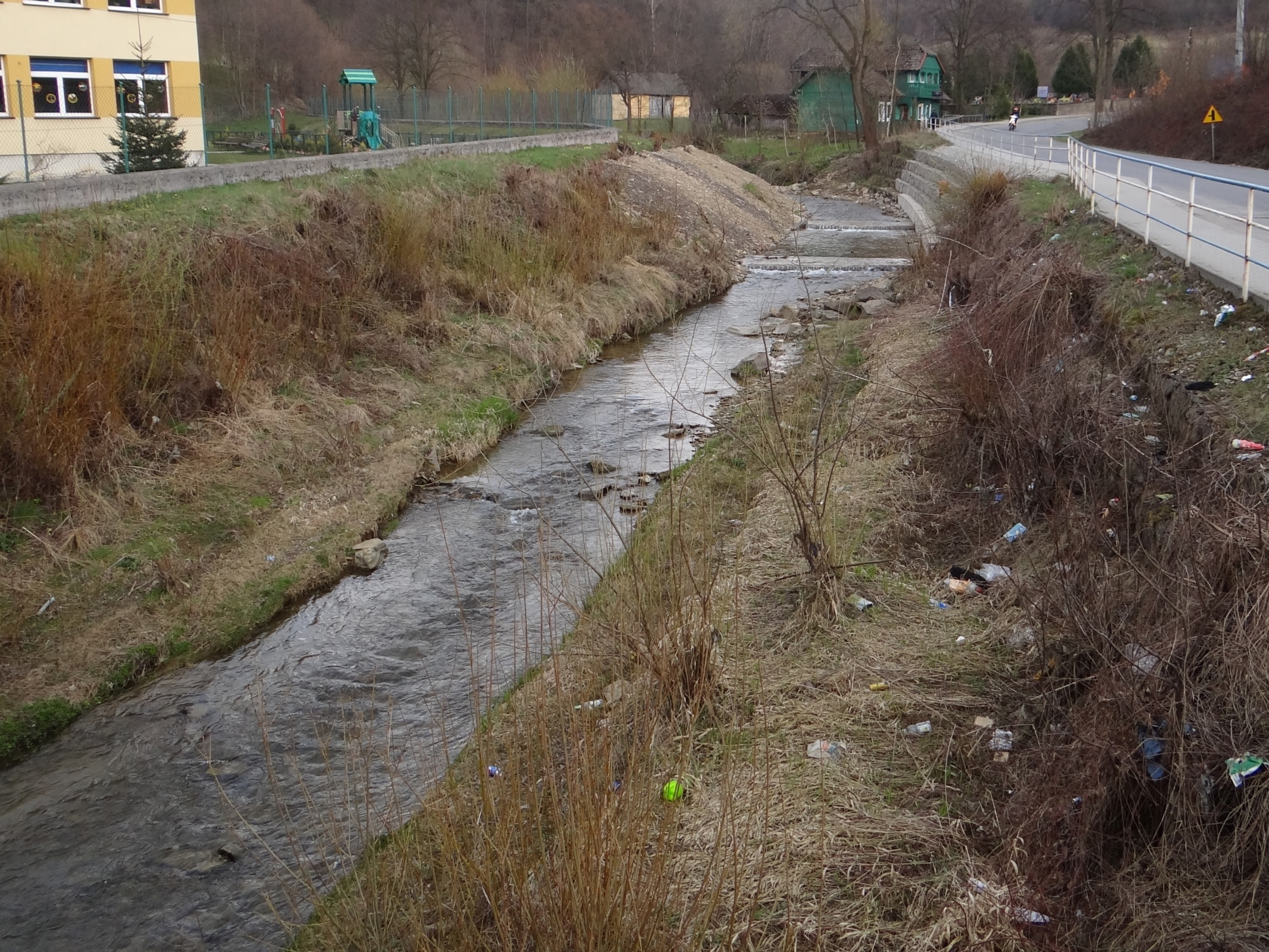 Przydoniecki Potok